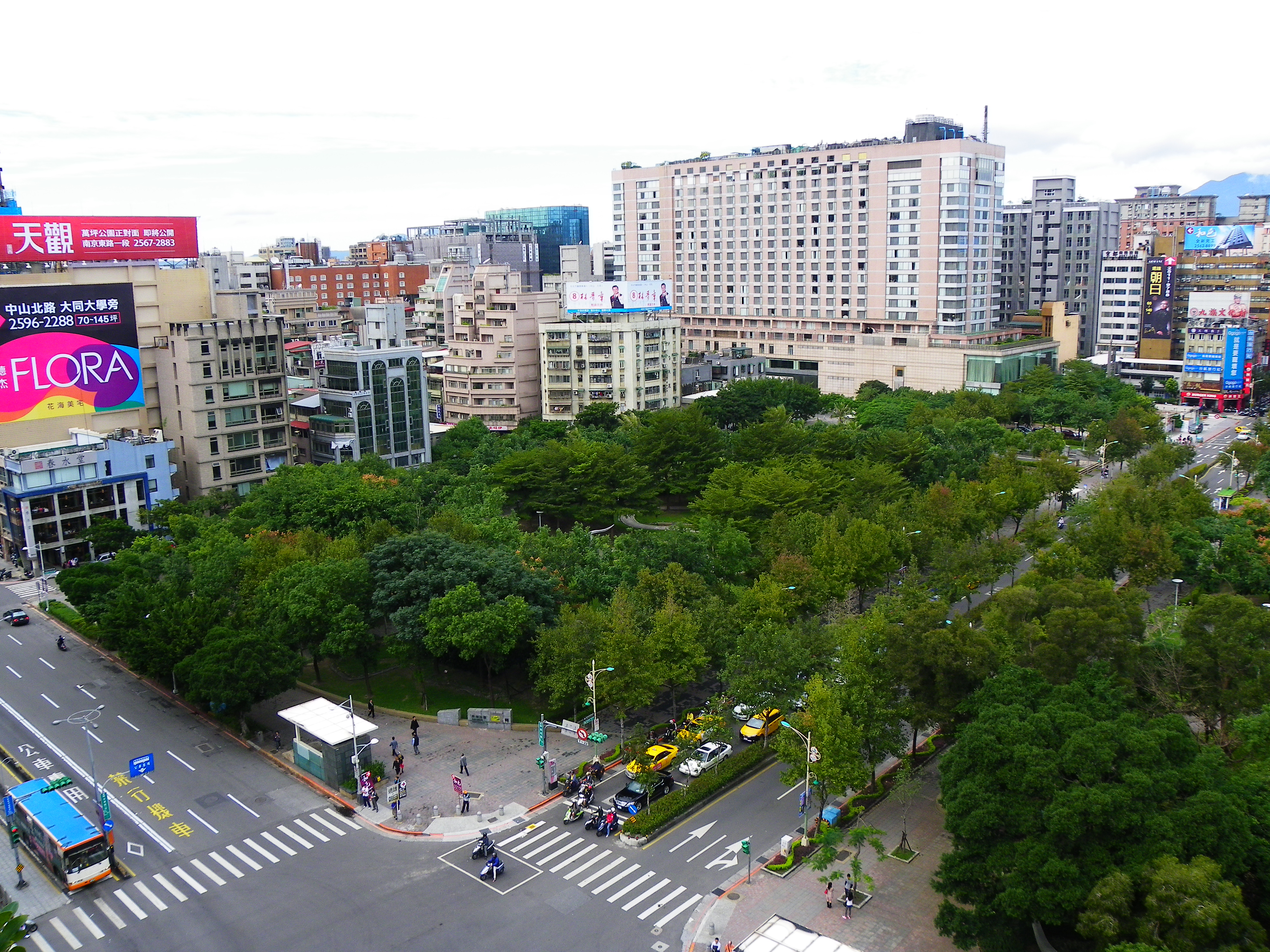 臺北市中山區康樂公園俯瞰，南北向的林森北路東側是林森公園，西北向遠方是晶華酒店南面。